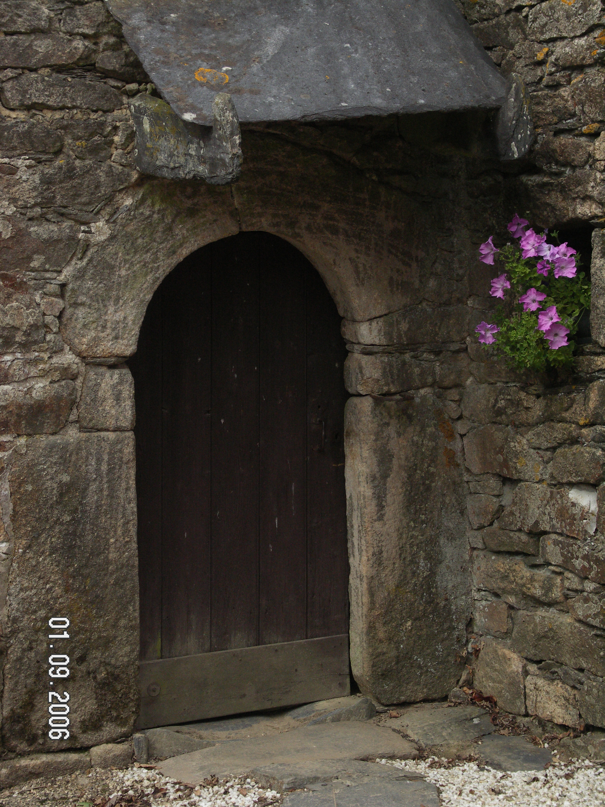 Entrée traditionnelle avec auvent en schiste ardoisier à Ty-ar-Yeun en Botmeur